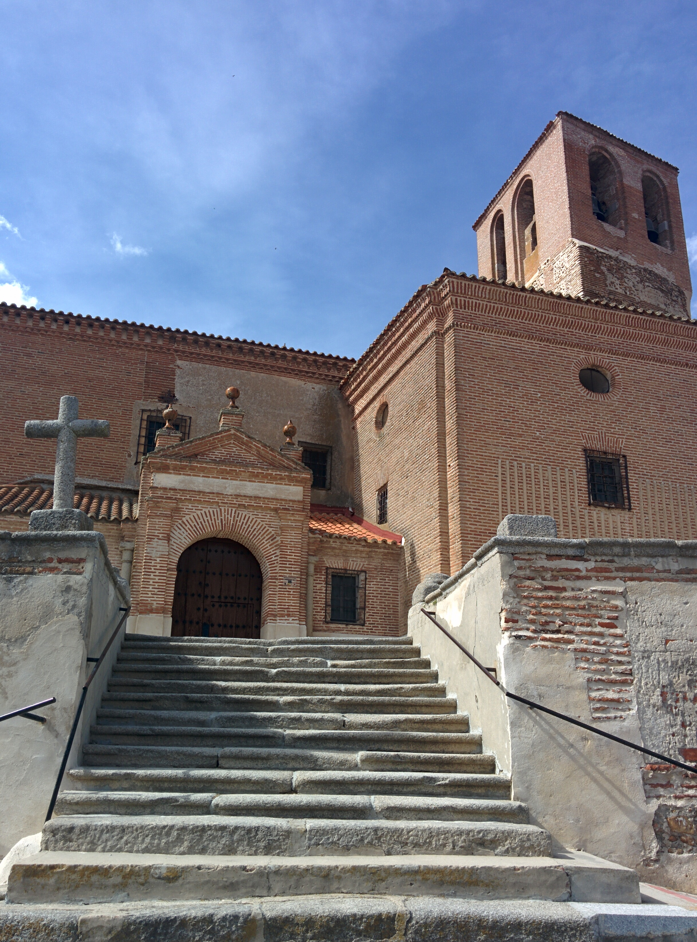 Iglesia de la Asunción de Nuestra Señora, en Barromán (Ávila, España).